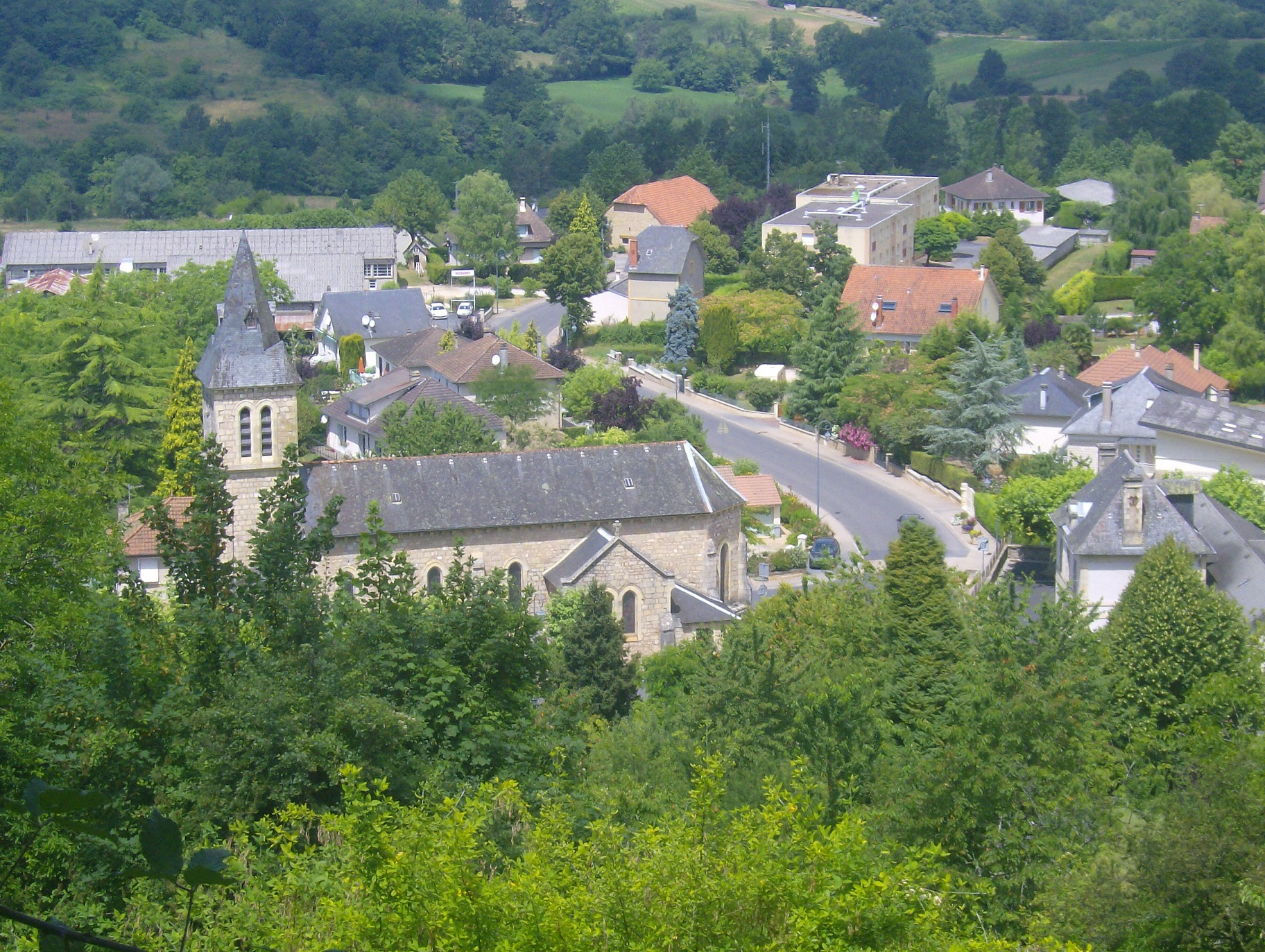 Vue sur l'église d'Ayen à partir d'un chemin montant à la butte d'Ayen